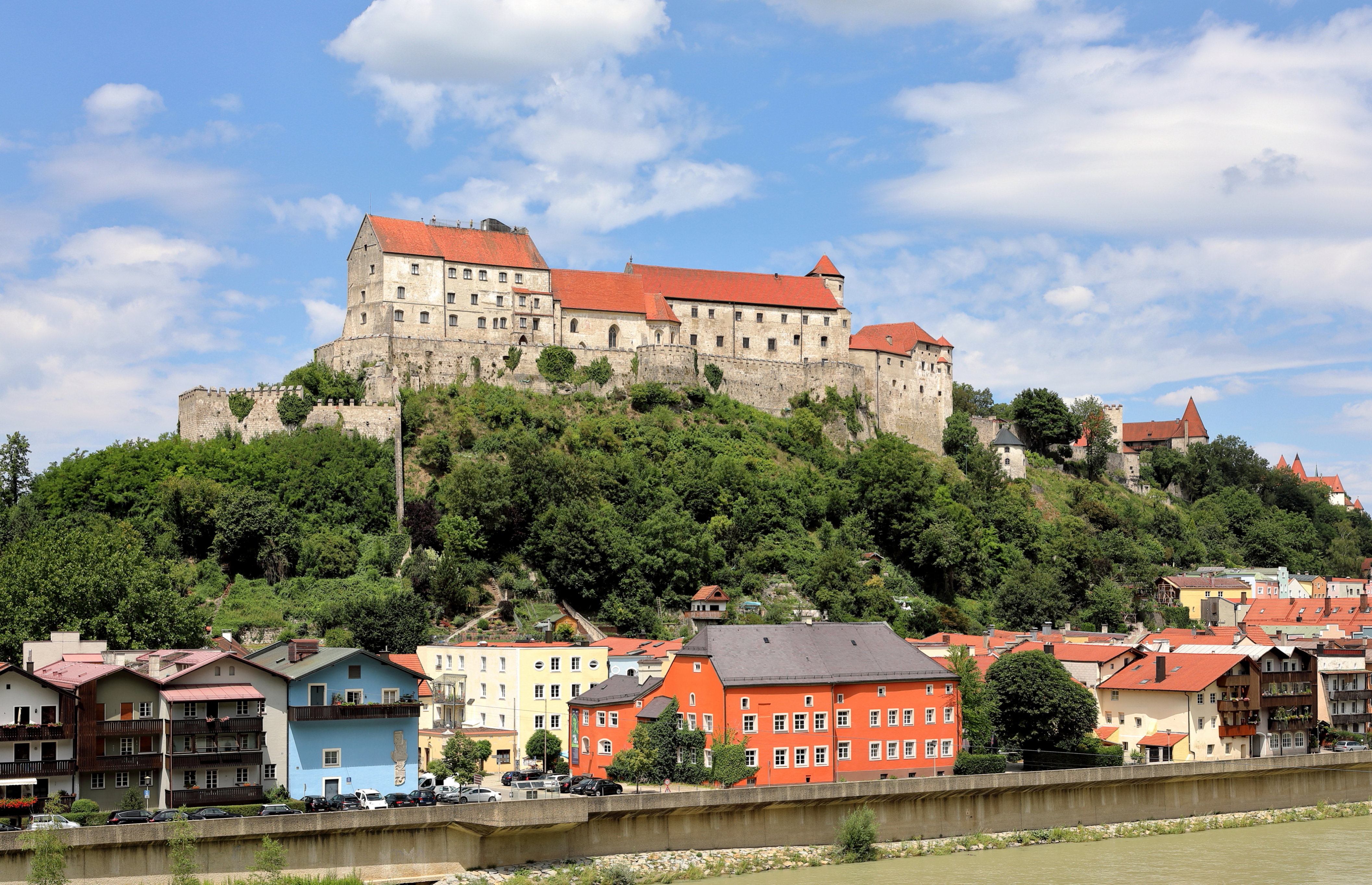 Südansicht der Hauptburg in der deutschen Herzogstadt Burghausen im oberbayerischen Landkreis Altötting.